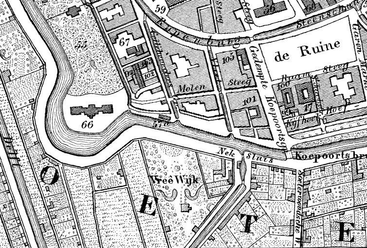 Uitsnede met Vreewijk uit de Plattegrond der stad Leiden en een aanwijzing harer openbare gebouwen en inrichtingen. Uit: Korte beschrijving van Leiden, wegwijzer voor vreemdeling en stadgenoot, van Jacobus Marinus Everhardus Dercksen, LEIDEN, DE BREUK & SMITS. 1874.